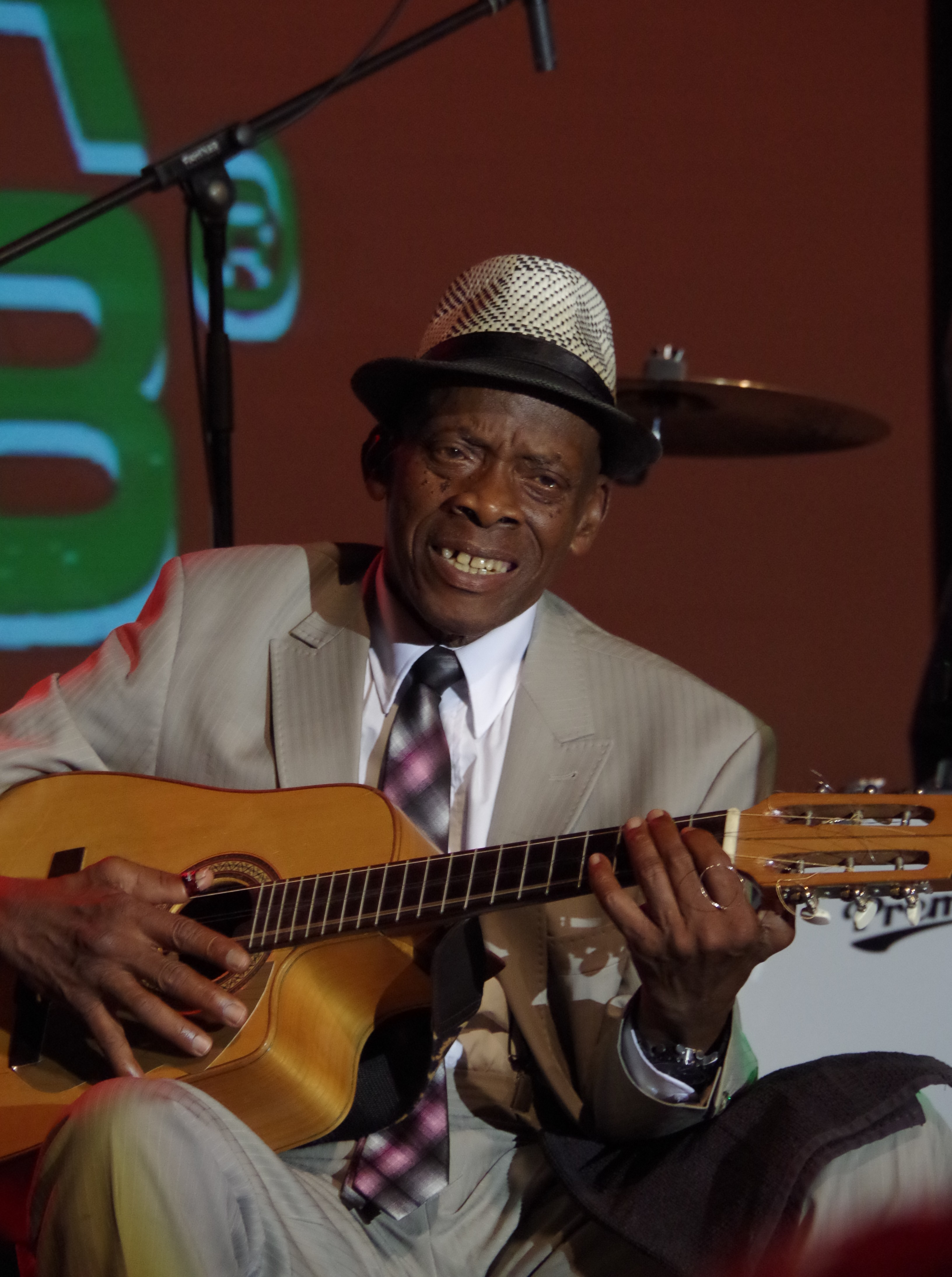 Das Zelt-Musik-Festival 2015 in Freiburg im Breisgau. 06.07.2015 Orquesta Buena Vista Social Club Papi Oviedo